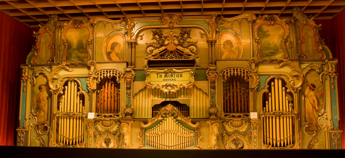 Winkelinterieur 268mortier dansorgel (terneuzen 1912)